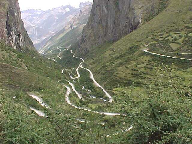 Carretera cruzando los Andes (Alfamayo Ollantaytambo) - Peru. Autor: Alfredobi. 2000